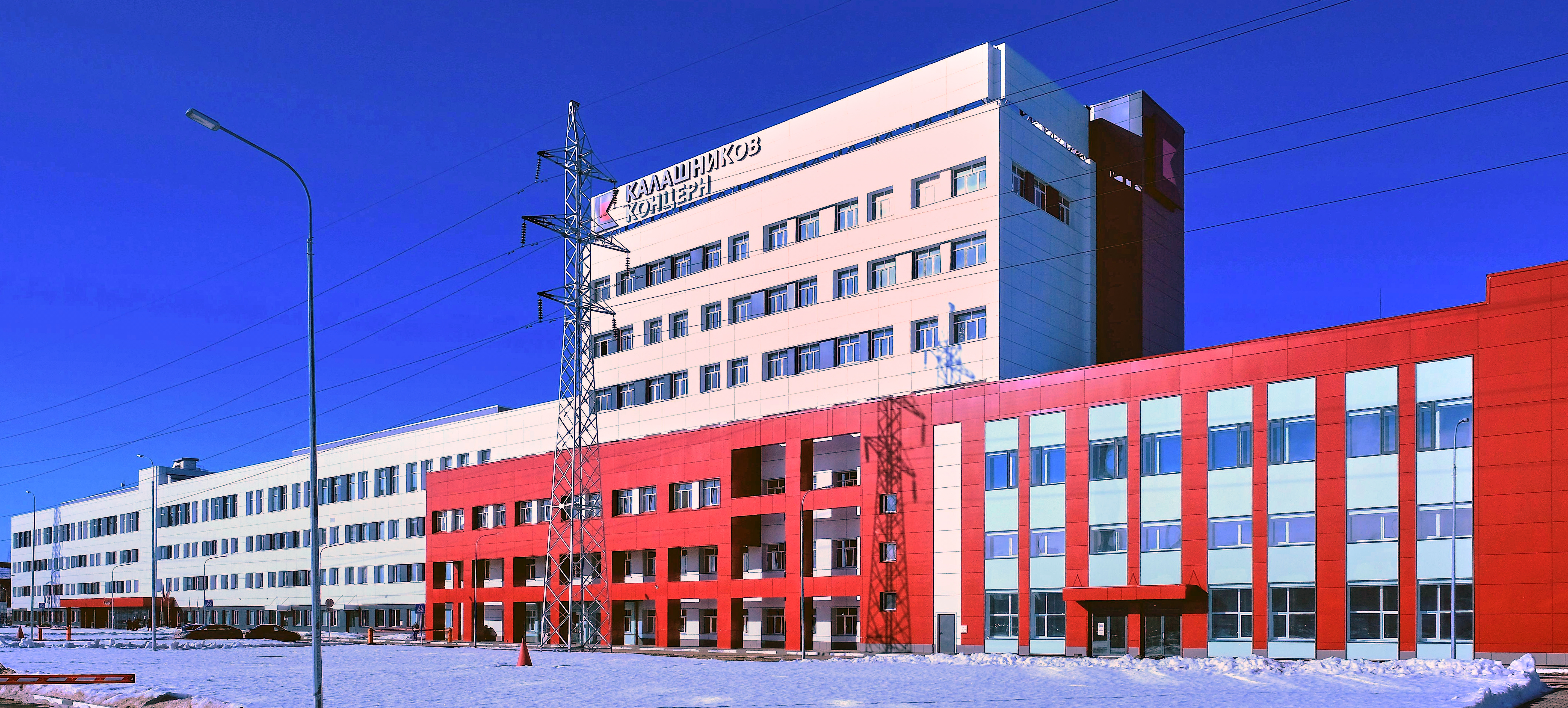 Офис Концерна Калашников в Ижевске по адресу пр. Дерябина, 3Б